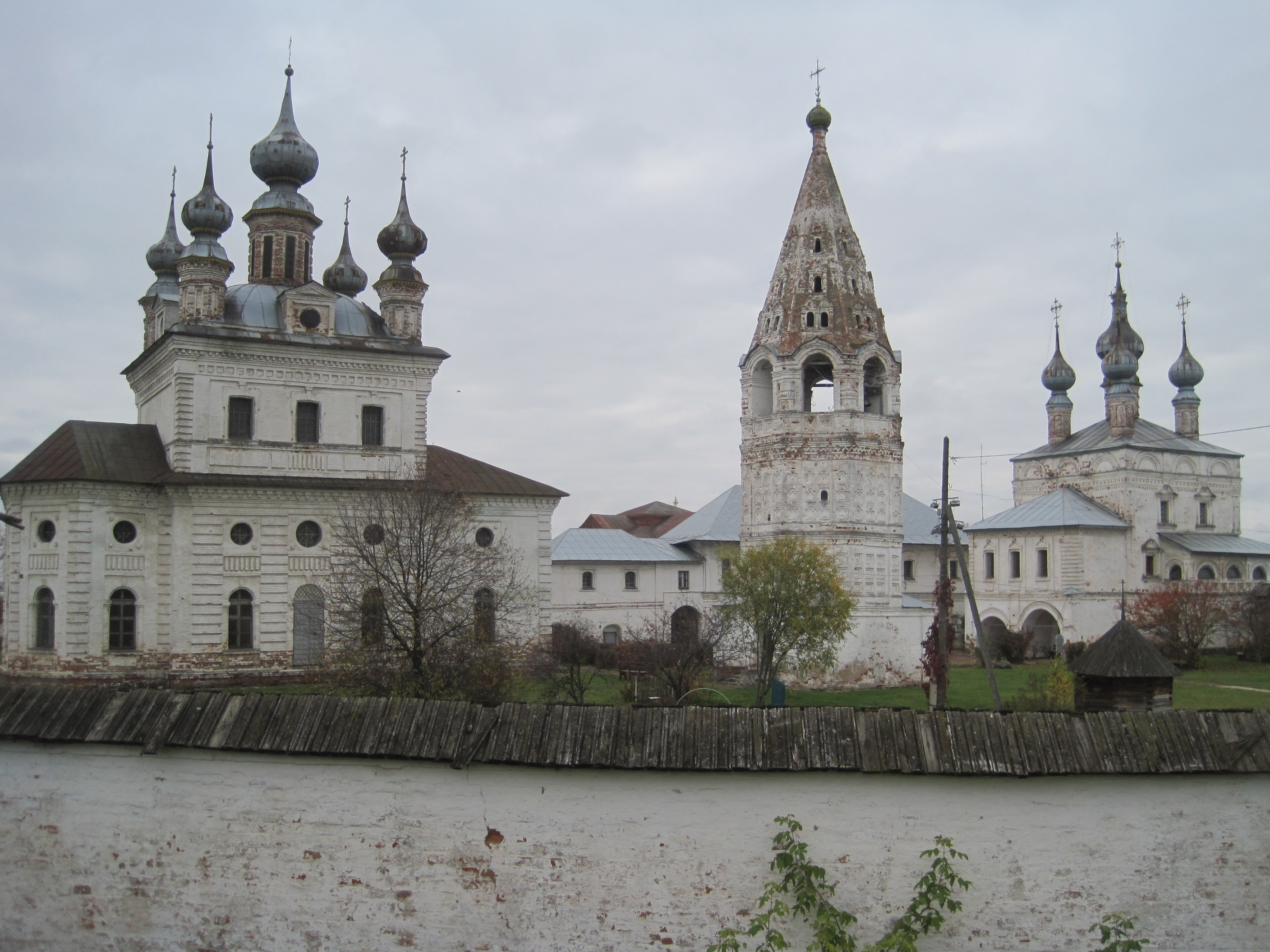 vue depuis l'extérieur de l'enceinte du monastère de Iourev-Polski